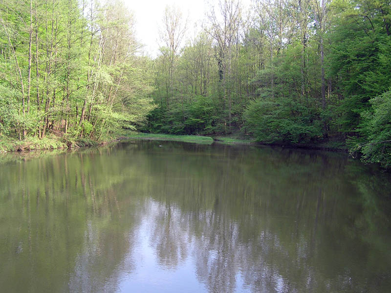 Bildbeschreibung: ... Quelle: selbst fotografiert Fotograf/Zeichner: Geheimnisträgerin Datum: 05.05.2006